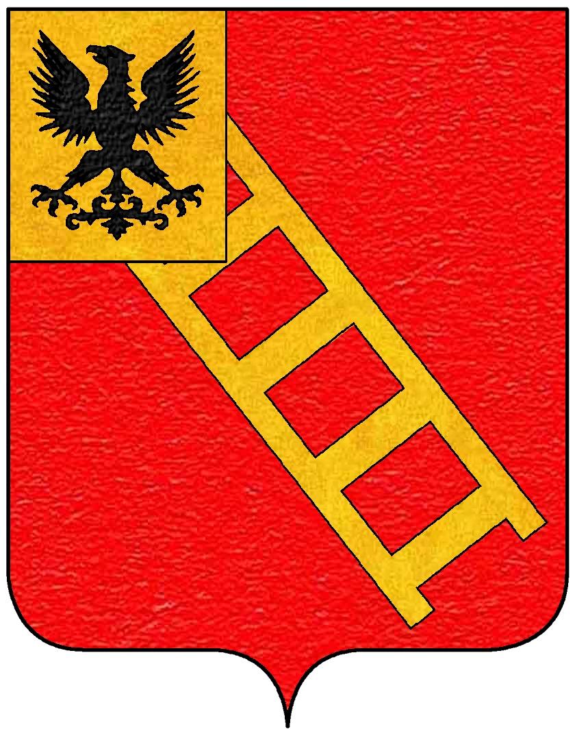 Stemma della famiglia Bona (Bunić)